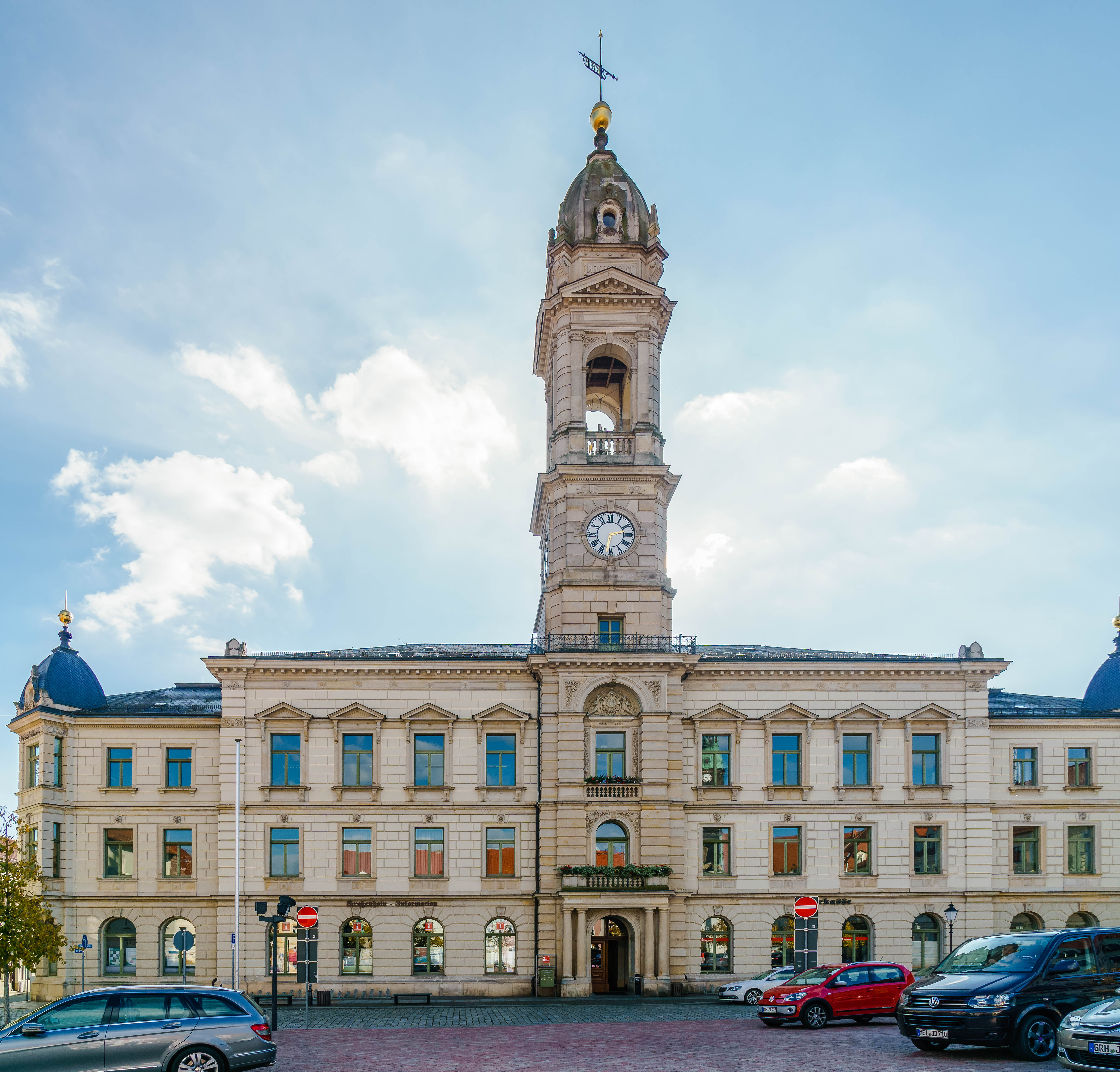 Rathaus, Hauptmarkt 1 in Großenhain